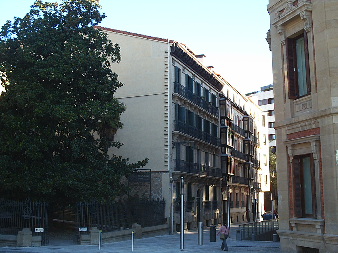 Pamplona calle Marqués de Rozalejo.